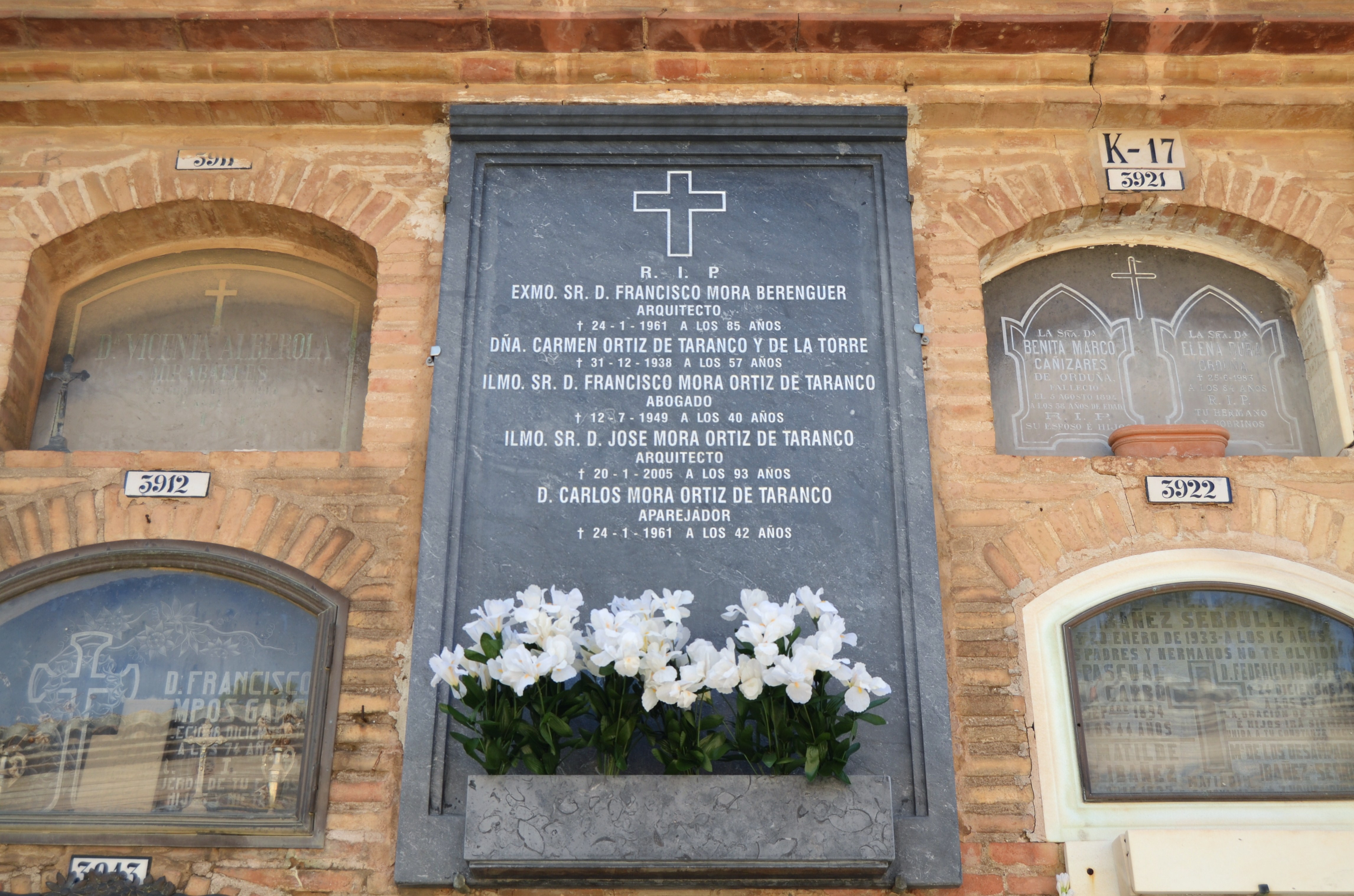 Tomba de l'arquitecte Francisco Mora Berenguer, cementeri general de València.